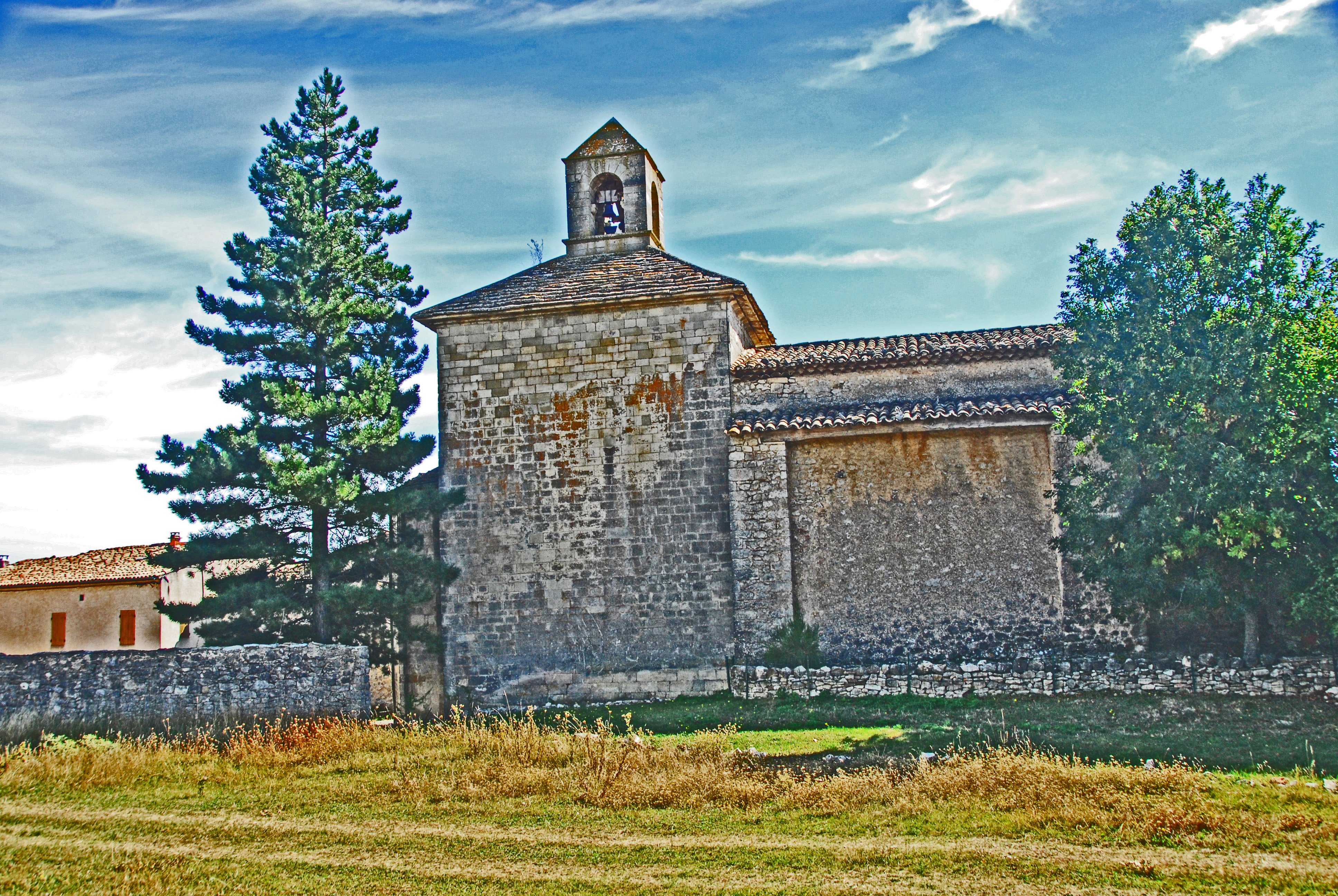 St-Trinit, Nordseite von N